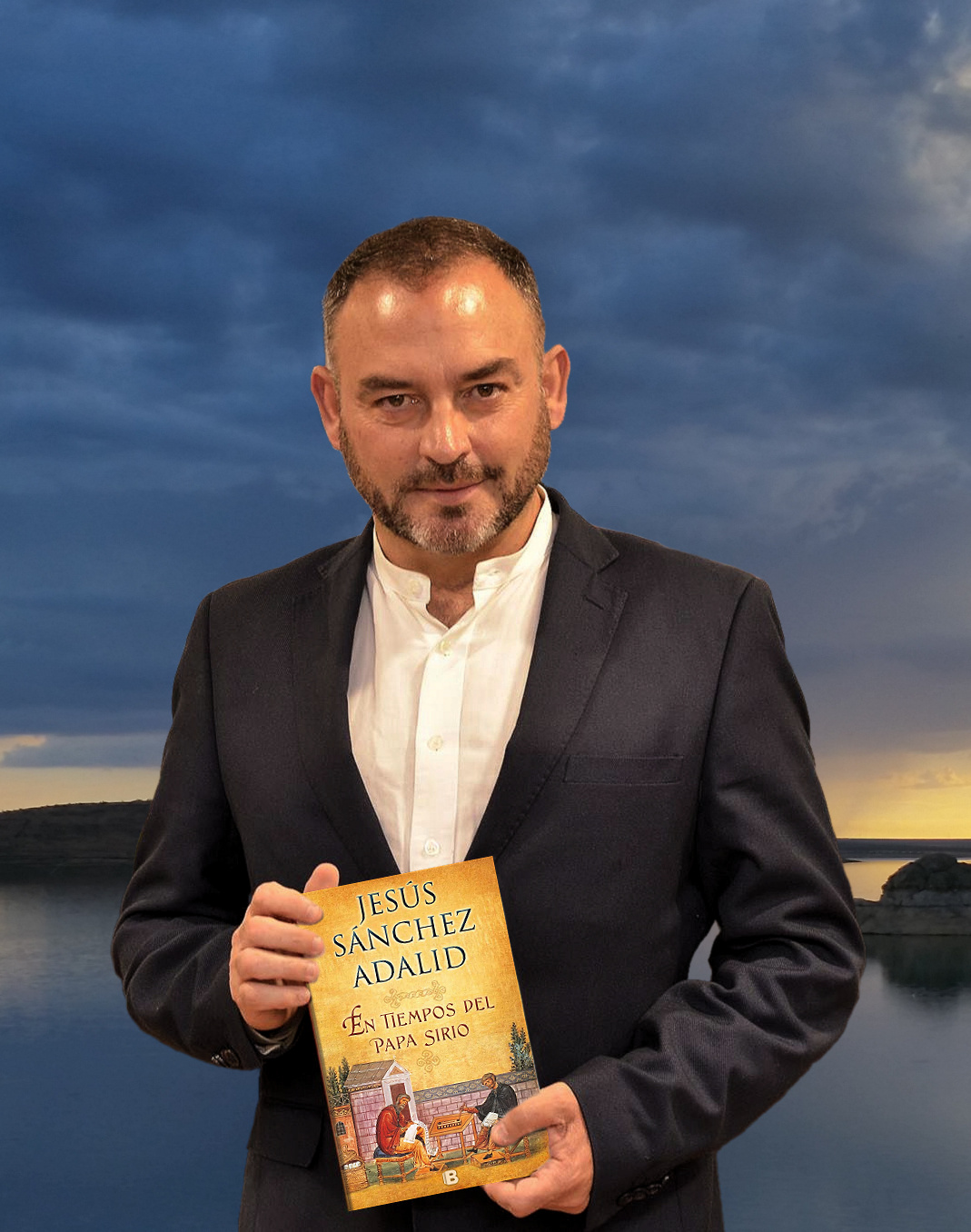 Foto de Jesús Sánchez Adalid con su nueva novela "En Tiempos de Papa Sirio"